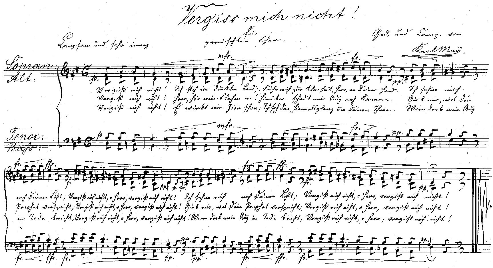 Manuskript der Noten mit Text zu Vergiß mich nicht